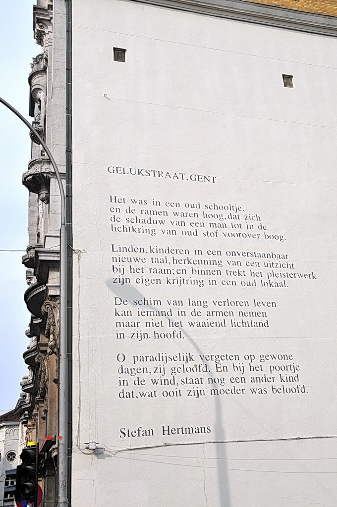 Gelukstraat, Gent Het was in een oud schooltje, en de ramen waren hoog, dat zich de schaduw van een man tot in de lichtkring van oud stof voorover boog. Linden, kinderen in een onverstaanbaar nieuwe taal, herkenning van een uitzicht bij het raam; en binnen trekt het pleisterwerk zijn eigen krijtkring in een oud lokaal. De schim van lang verloren leven kan iemand in de armen nemen, maar niet het waaiend lichtland in zijn hoofd. O paradijselijk vergeten op gewone dagen, zij geloofd. En bij het poortje, in de wind, staat nog een ander kind - dat, wat ooit zijn moeder was beloofd. Geschreven door: Stefan Hertmans.